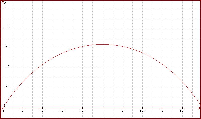 Kvadratrix Hippiász-féle görbe kiterjesztése a valós számok halmazára